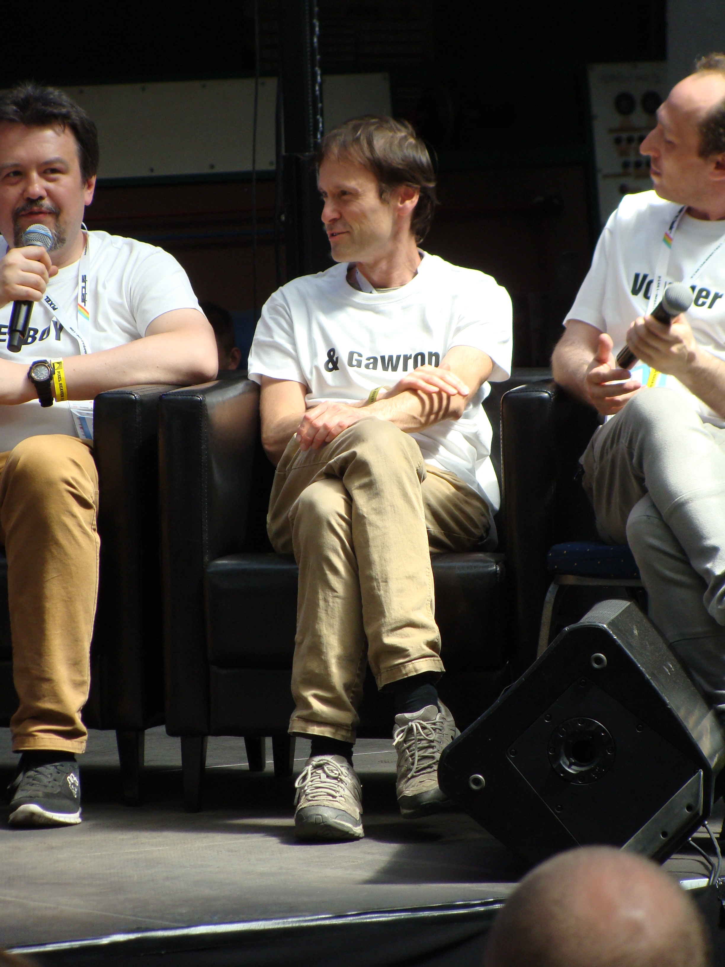 Piotr Gawrysiak podczas spotkania członków redakcji "Top Secret" na festiwalu "Pixel Heaven", 27 maja 2017, Warszawa.